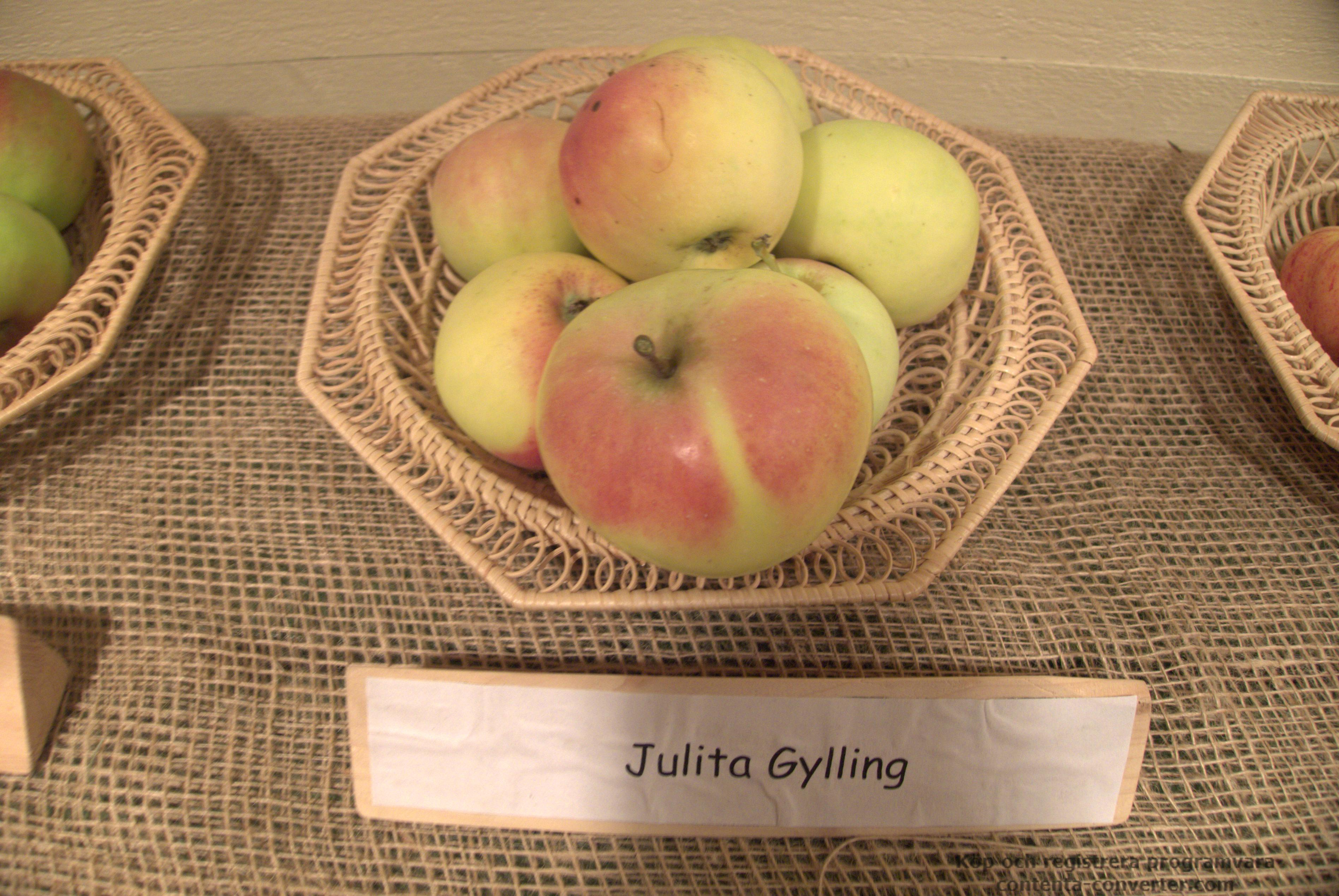 Äpplen av sorten Julita Gylling